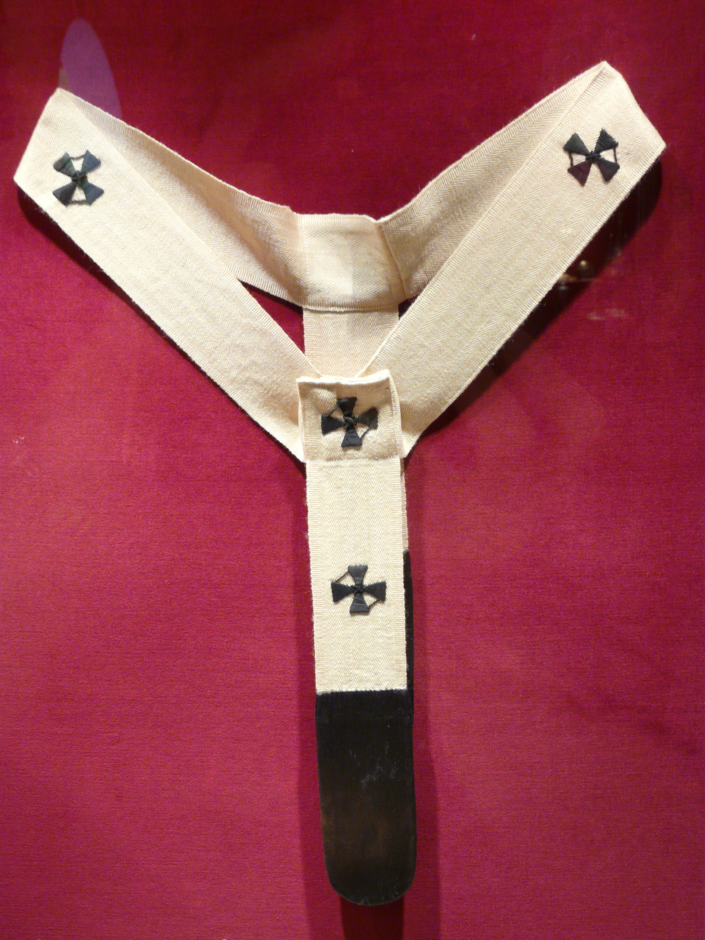 Museum of Archdiocese in Gniezno Paliusz Jana XXIII. Paliusz wykonany tradycyjnie, z wełny jagnięcia poświęconego w dzień św. Agnieszki, a po utkaniu i uszyciu przechowywany w Grotach Watykańskich w szkatule nad grobem św. Piotra. Noszony w czasie liturgii przez przyszłego papieża Jana XXIII przed jego wyborem (1958) na biskupa Rzymu.